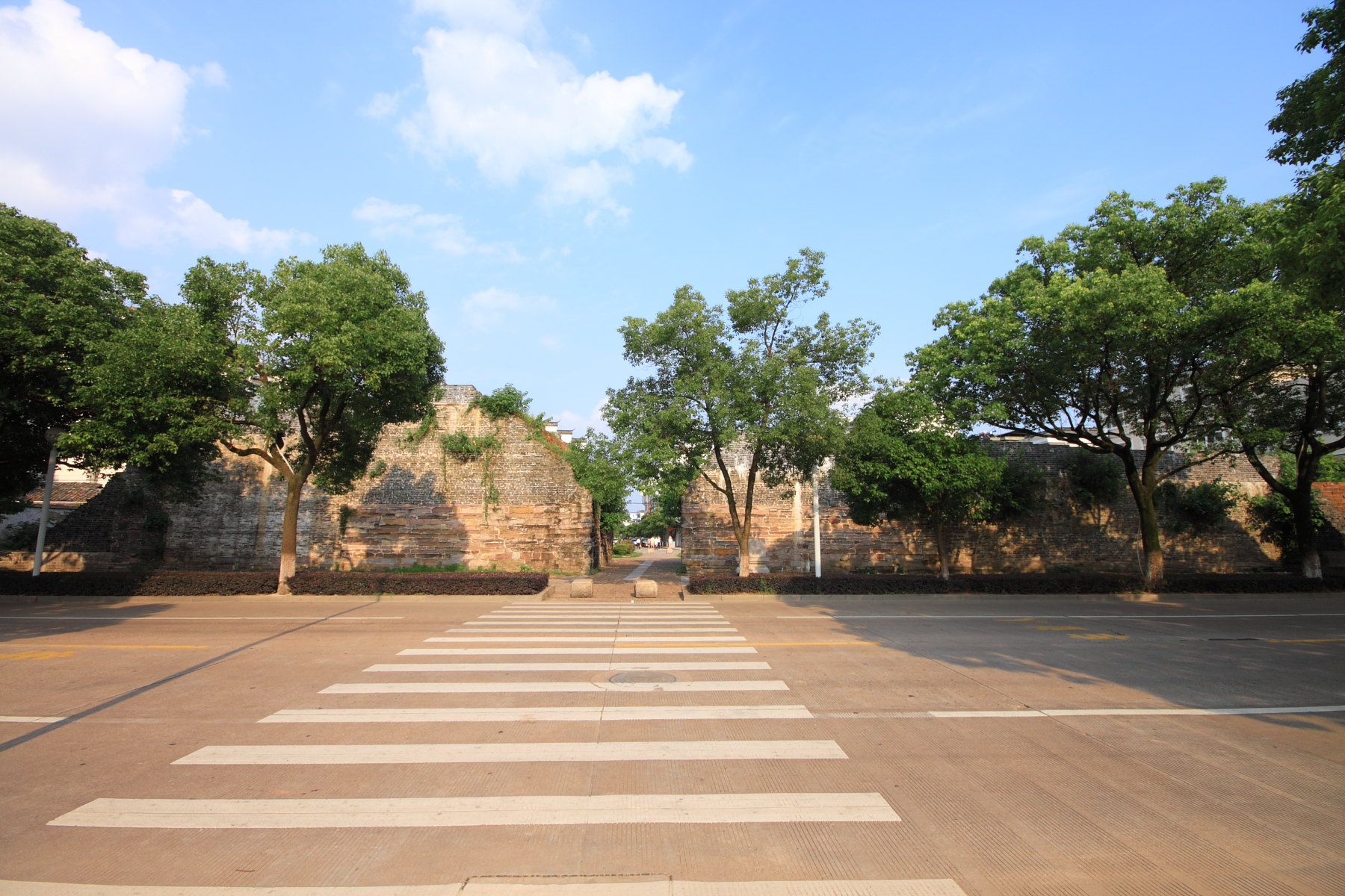 衢州城墙和丰门，全国重点文物保护单位，位于衢州市。